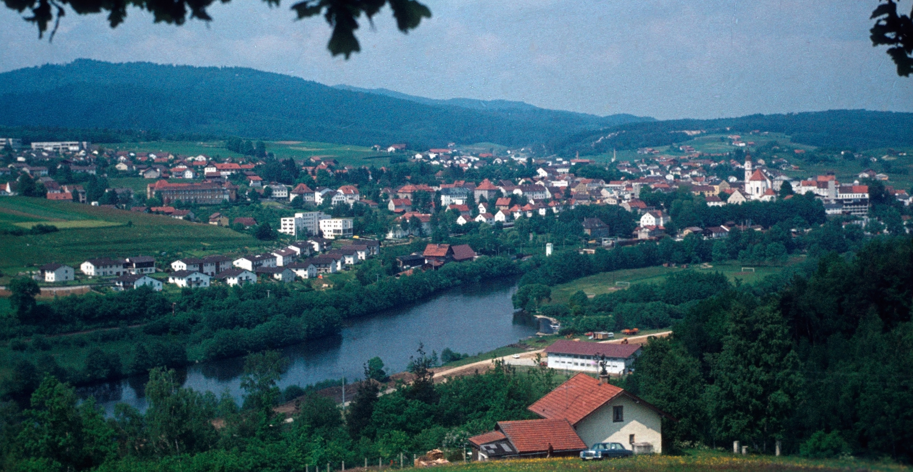 Blick über Viechtach.